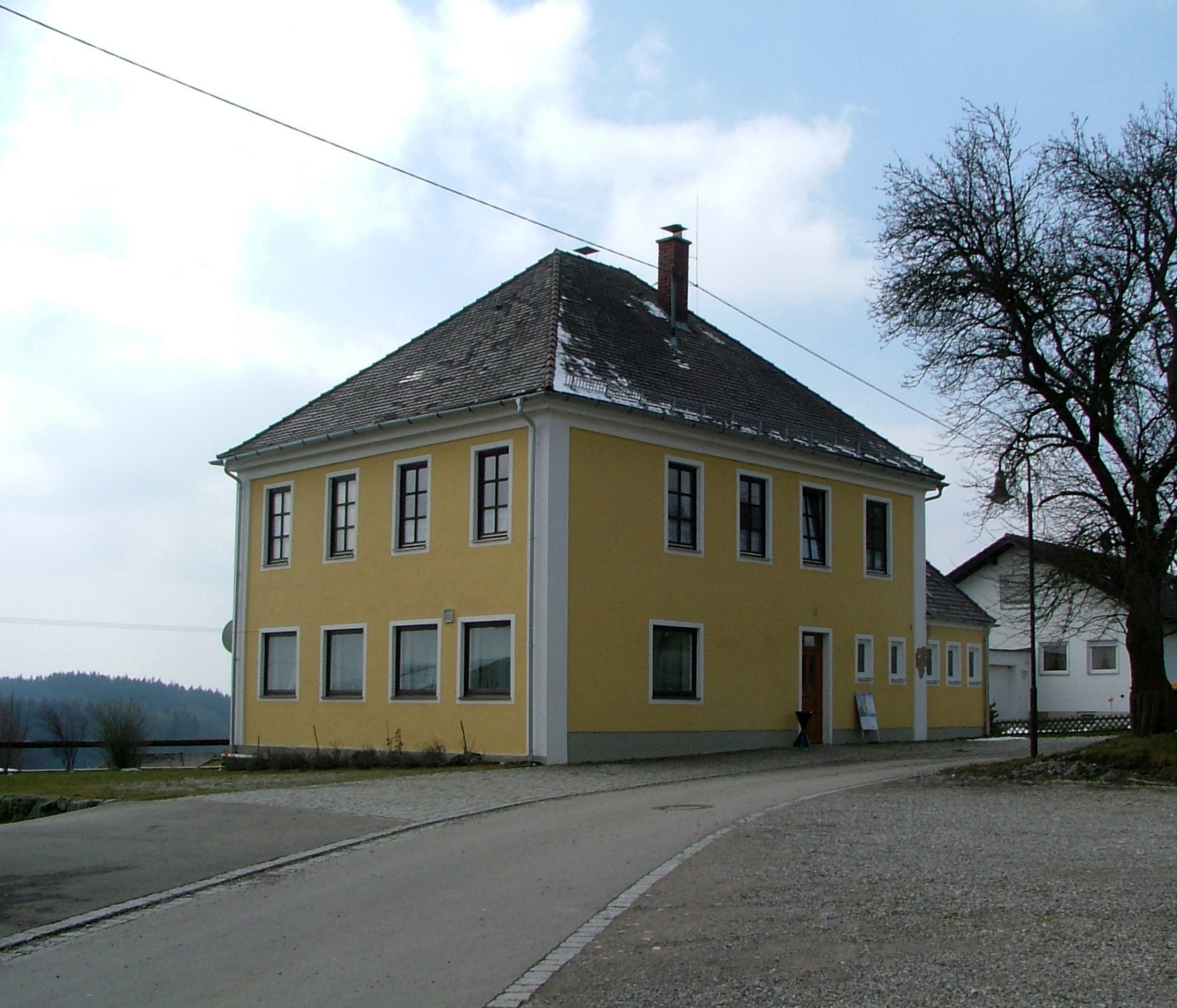 Schulgebäude